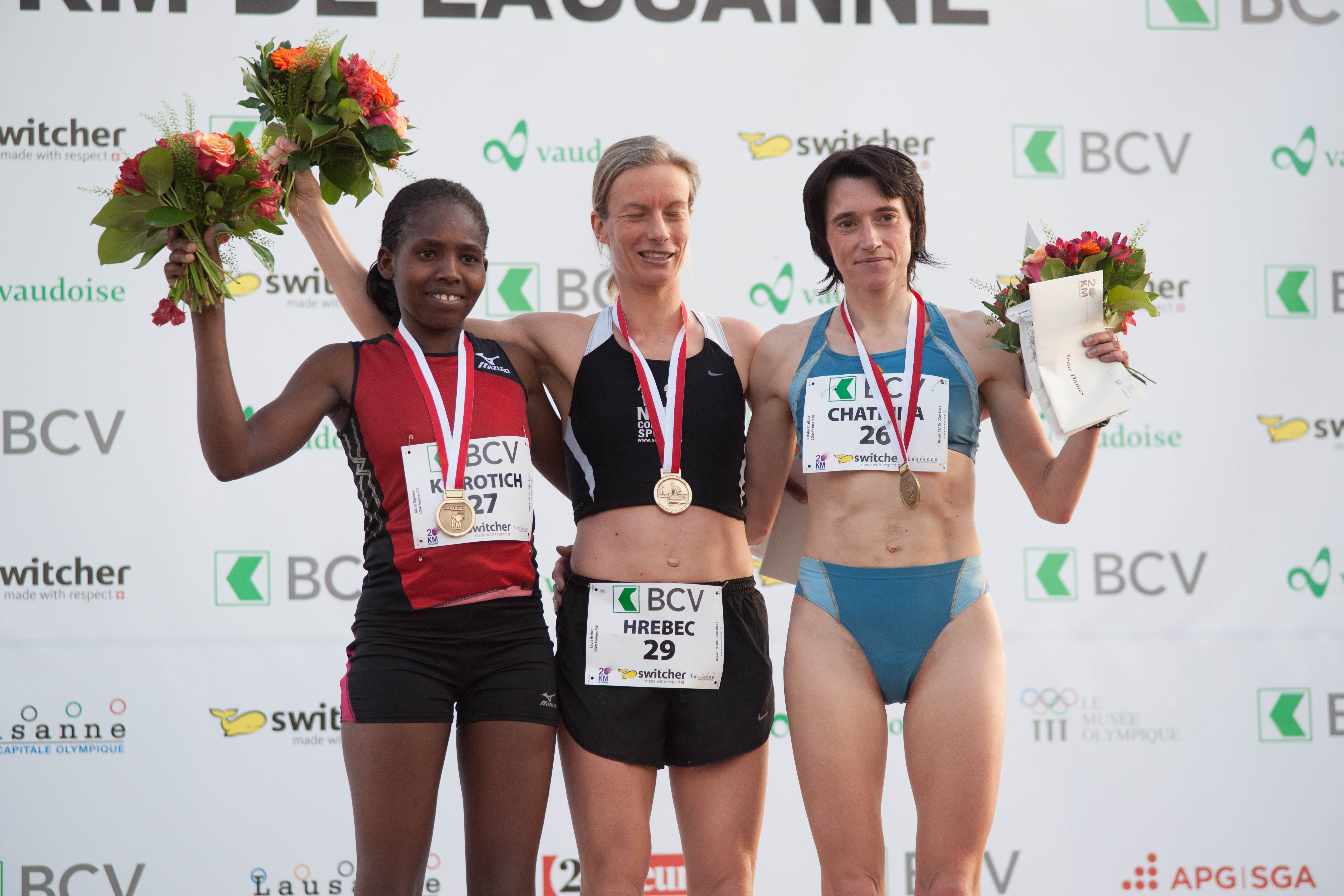 Laura Hrebec (winner) ; Women's podium - 20 km de Lausanne 2012